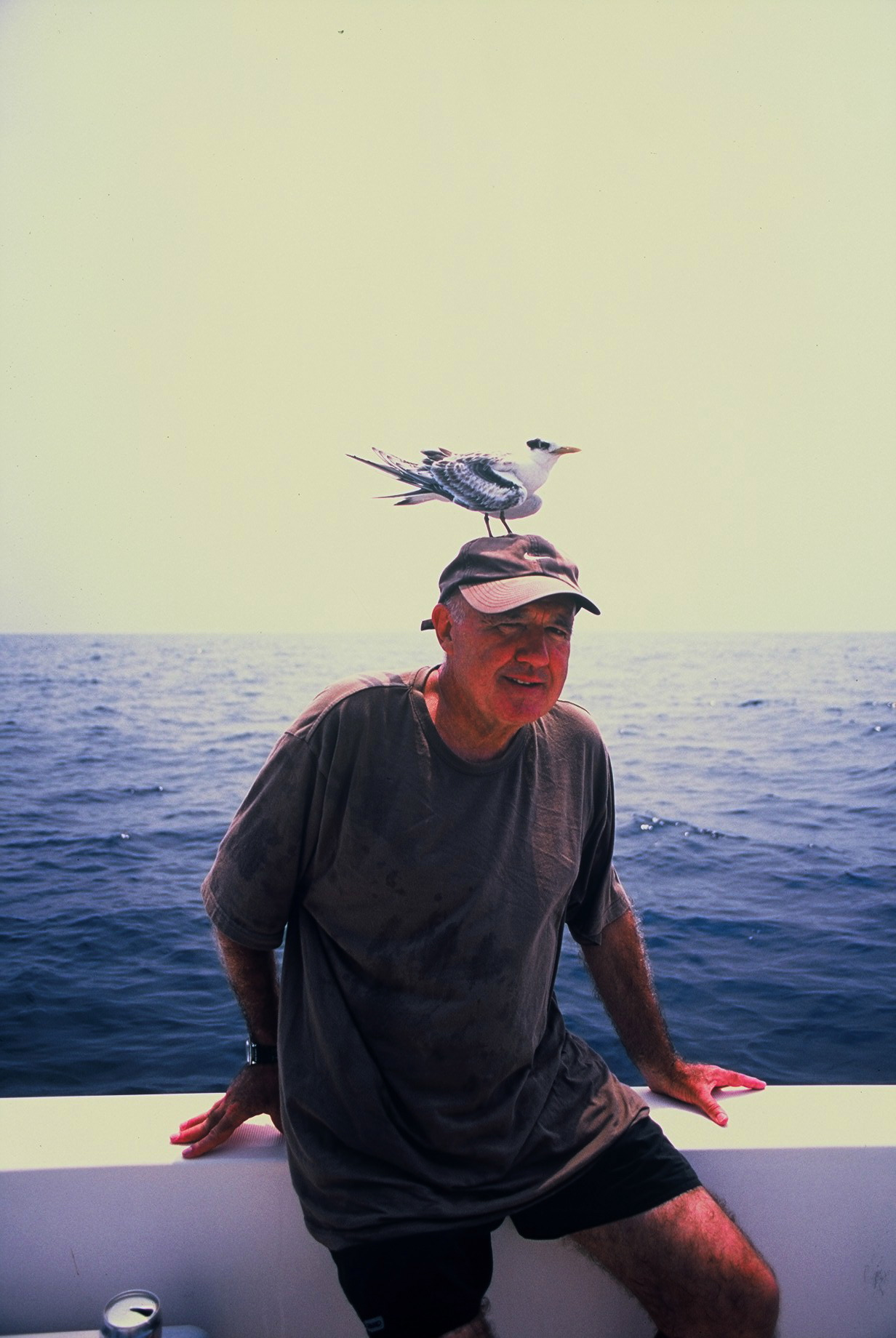 Le photographe Claude Rives adopté par une Sterne dans le golfe Arabique